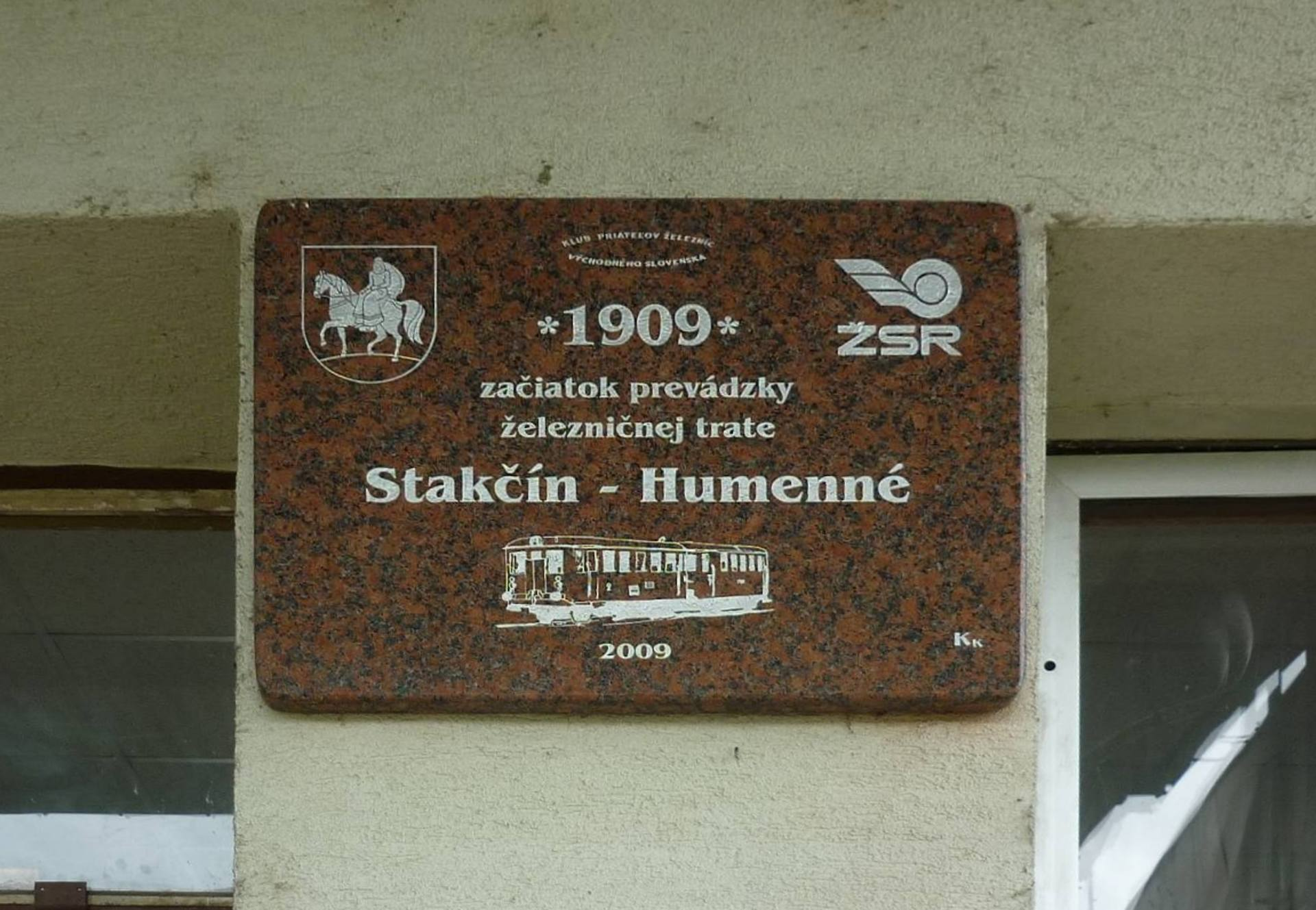 Pamětní deska na zahájení provozu na železniční trati Humenné - Stakčín